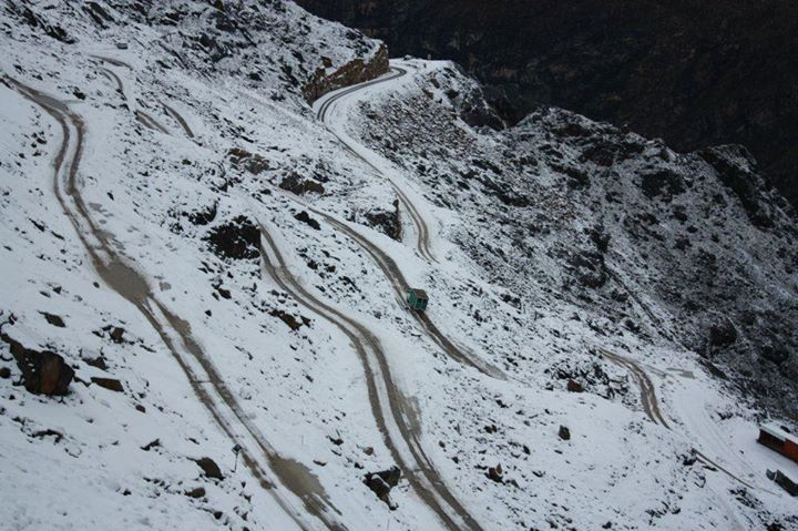 Carretera Carhuaz - Chacas (sector Punta Olimpica)